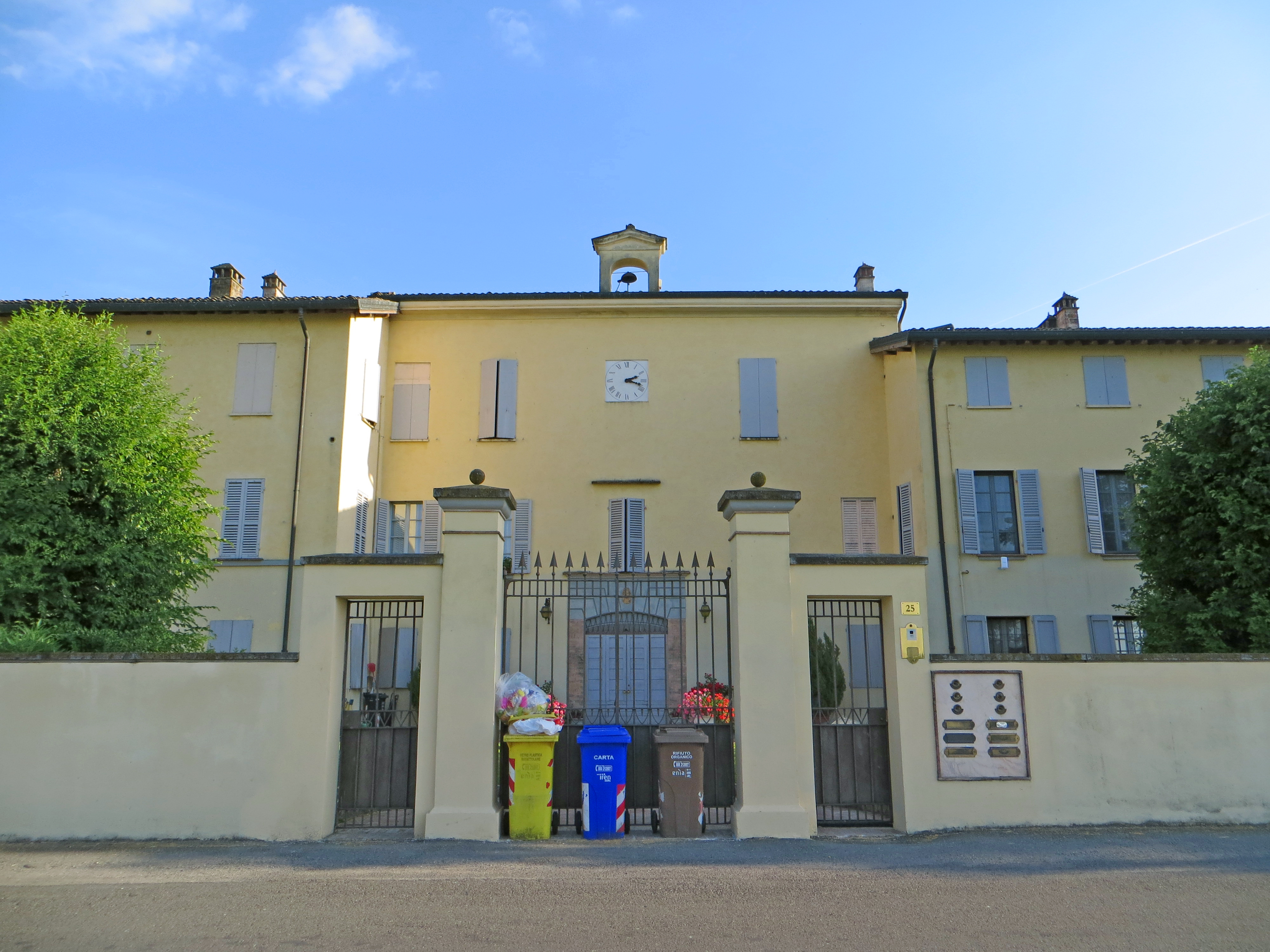 Villa Petitot (Marore, Parma) - facciata